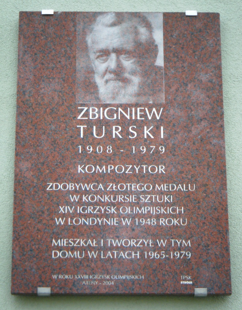 Tablica upamiętniająca Zbigniewa Turskiego. Warszawa, Saska Kępa, al. Stanów Zjednoczonych 18.